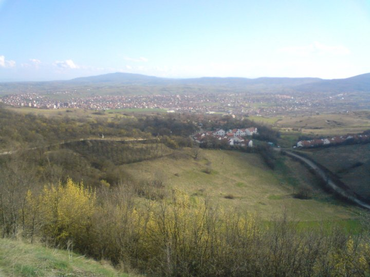 Pogled na Mali Zvečan i Kosovsku Mitrovicu sa tvrđave Zvečan. Slikano 30. marta 2010.